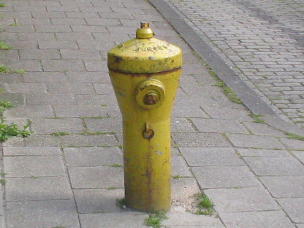 eigen foto